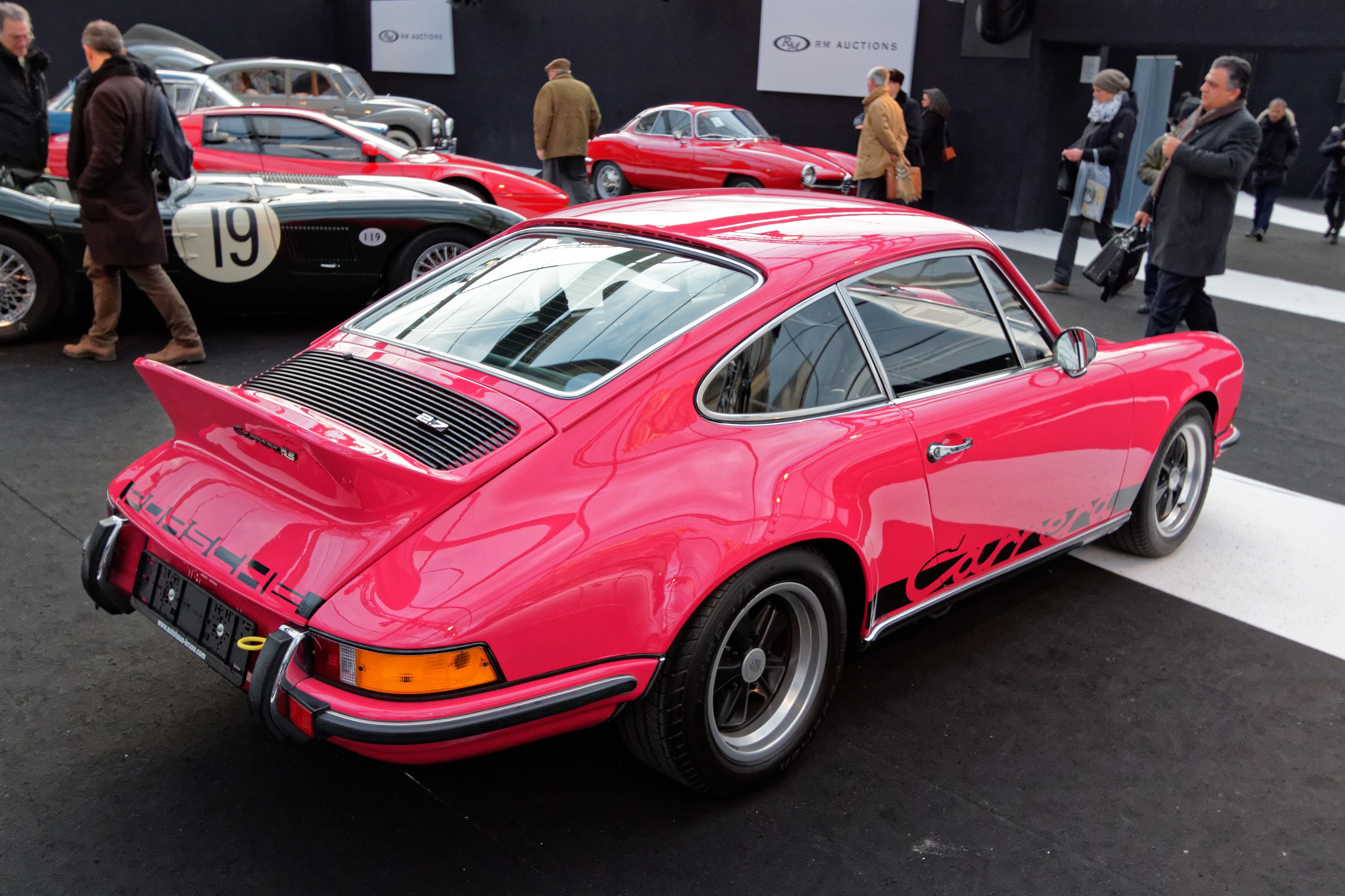 La vente aux enchères RM auctions aux pied des Invalides à Paris le 4 février 2015.